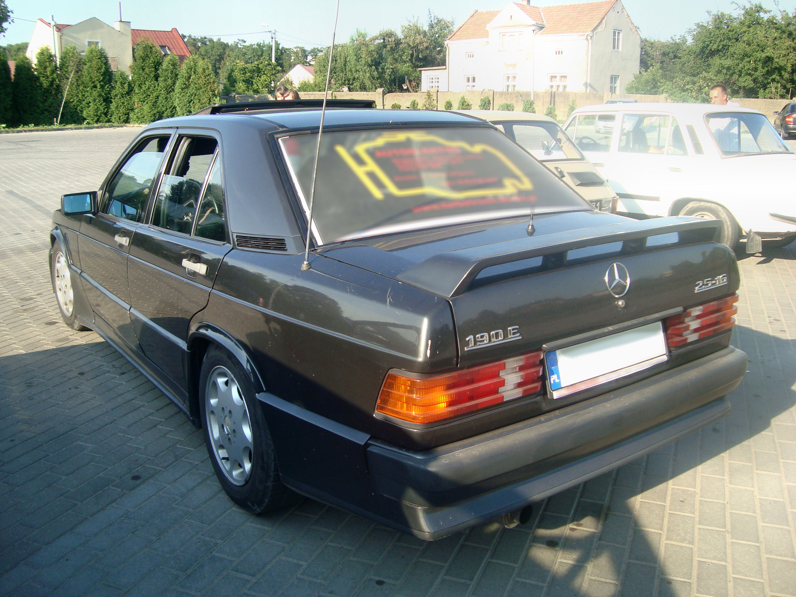 Mercedes-Benz W201 190E 2.5-16 w Jaśle.